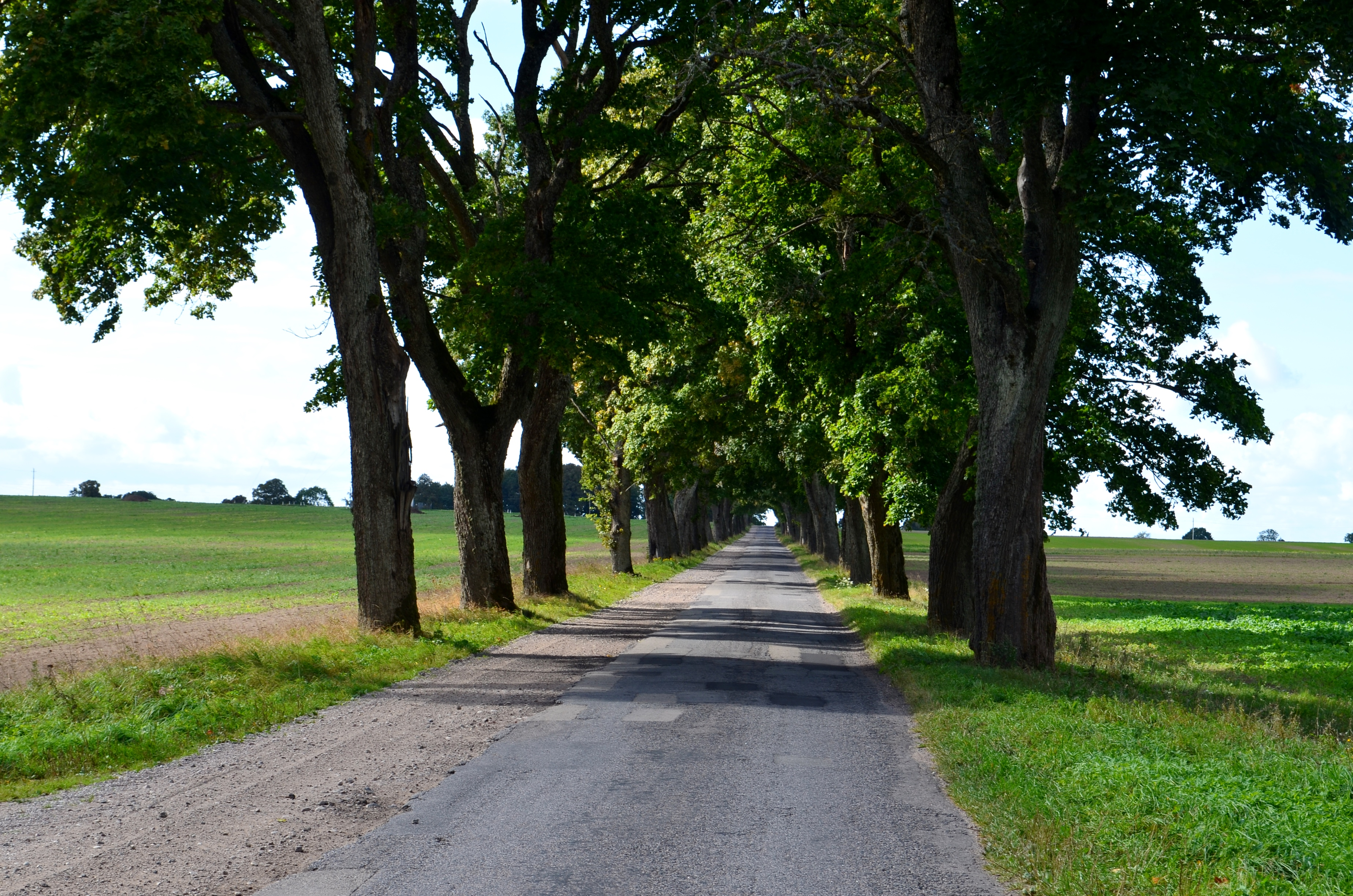 Žemaitėška: Kloguonā, klevū aliejė, Šėlotės rajuons